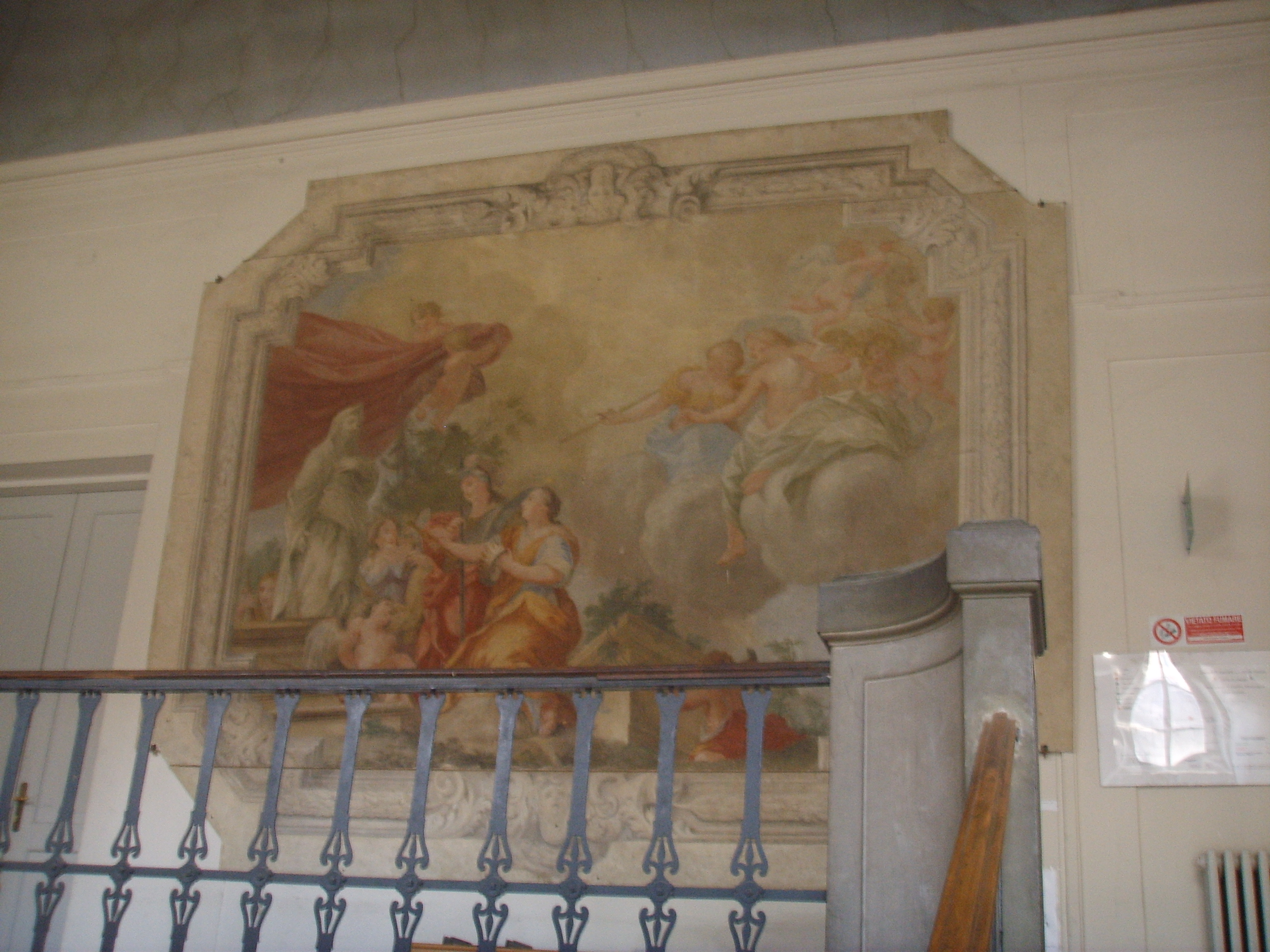 Palazzo Cocchi Serristori in Florence, italy